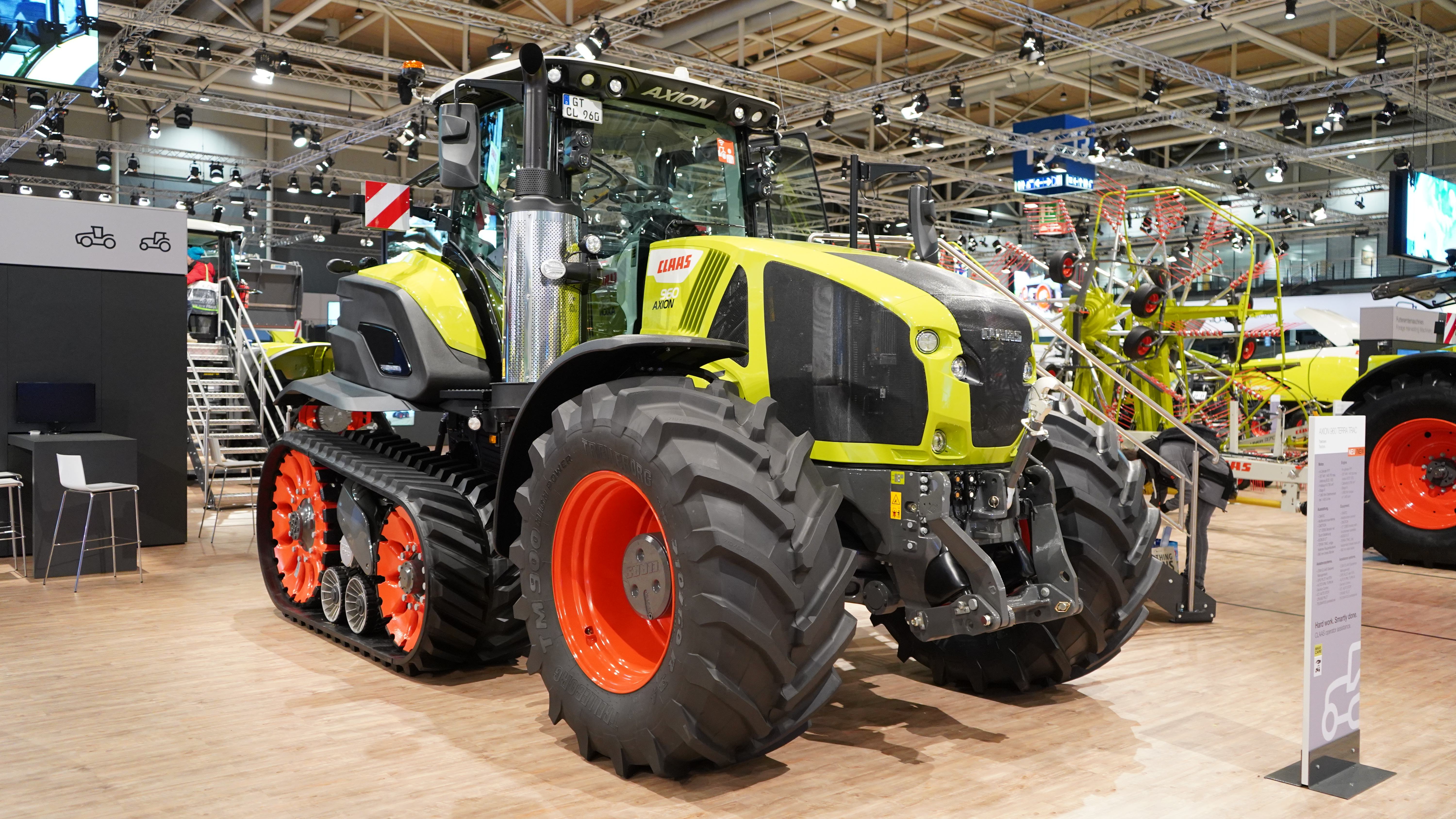 Schrägansicht der Front eines Claas Axion 960 Terra Trac, ausgestellt auf der Agritechnica 2019.